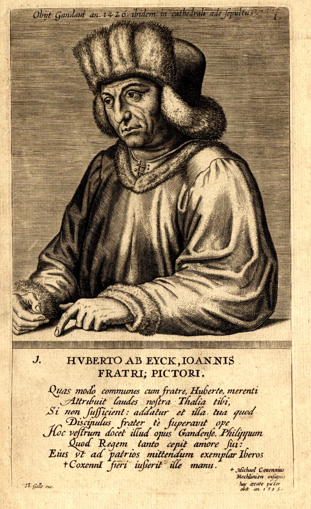 Hubert van Eyck (1366–1426) by Edme de Boulonois (16??-16??). Illustration from Isaac Bullart, Académie des sciences et des arts, contenant les vies et les éloges historiques des hommes illustres qui ont excellé en ces professions depuis environ quatre siècles parmy diverses nations de l'Europe, F. Foppens, Bruxelles, 1682. Newer version from The portraits of the most eminent painters, and other famous artists that have flourished in Europe : curiously engraved on above one hundred copper plates